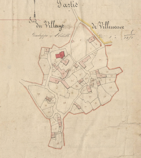 El poble de Vilanova de les Escaldes, del terme d'Angostrina i Vilanova de les Escaldes, en el Cadastre Napoleònic del 1812 (Arxius Departamentals dels Pirineus Orientals)